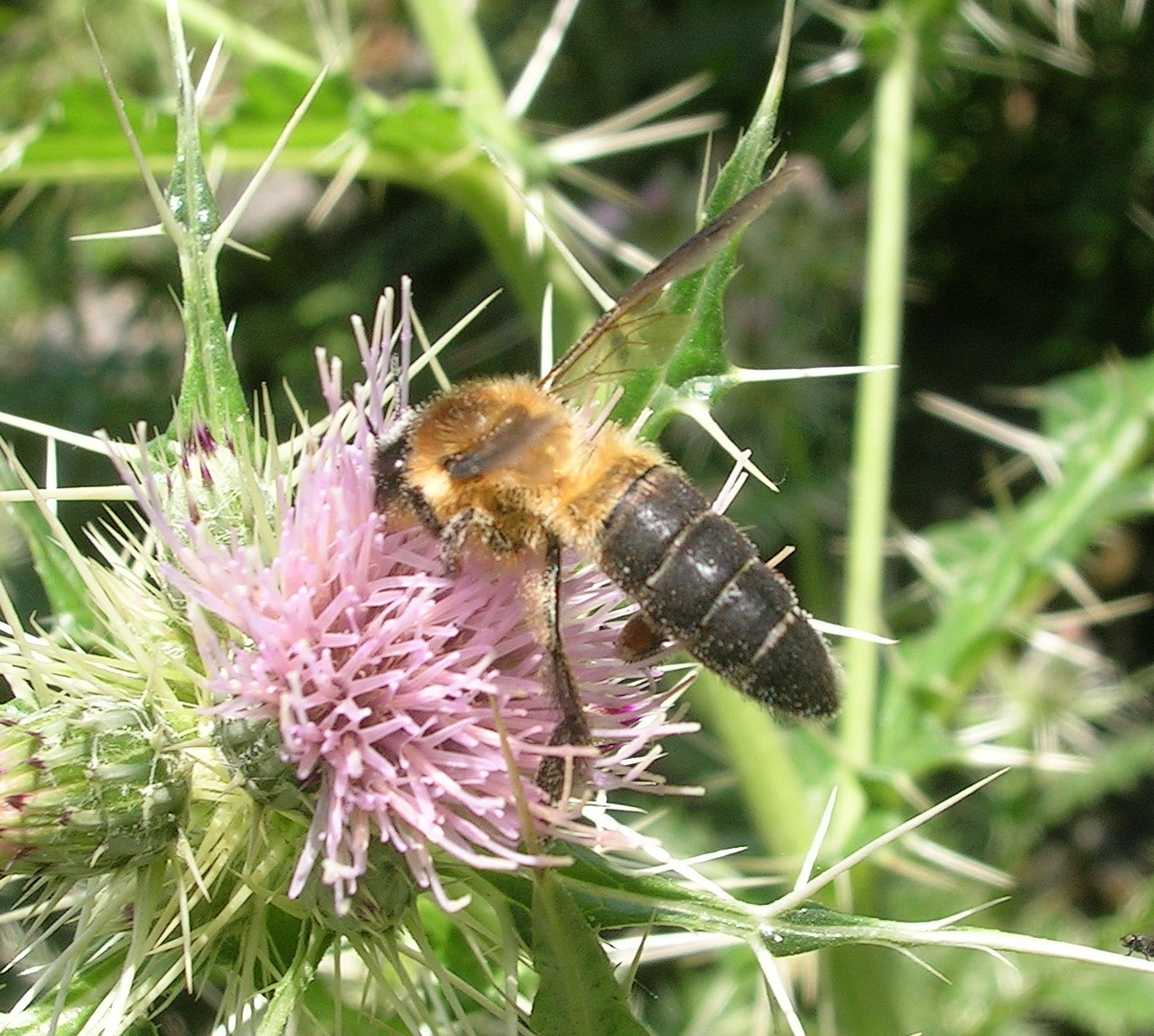 Apis laboriosa syn. Apis dorsata laboriosa, Pithoragarh, Himalayas